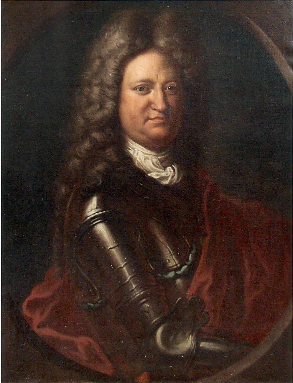 Porträt Gottfried Laurenz Pictorius'